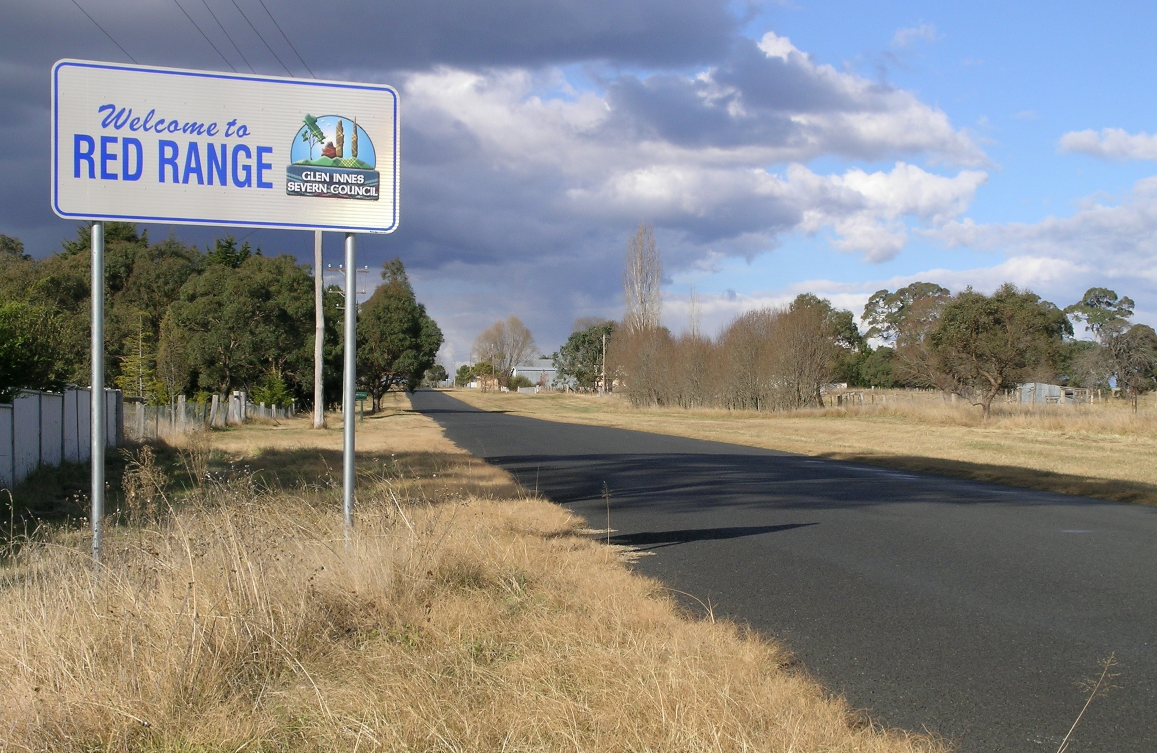 Red Range, NSW